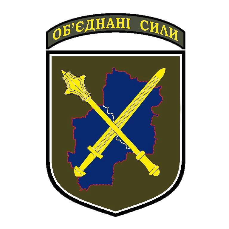 Офіційна емблема Операції об'єднаних сил (ООС)